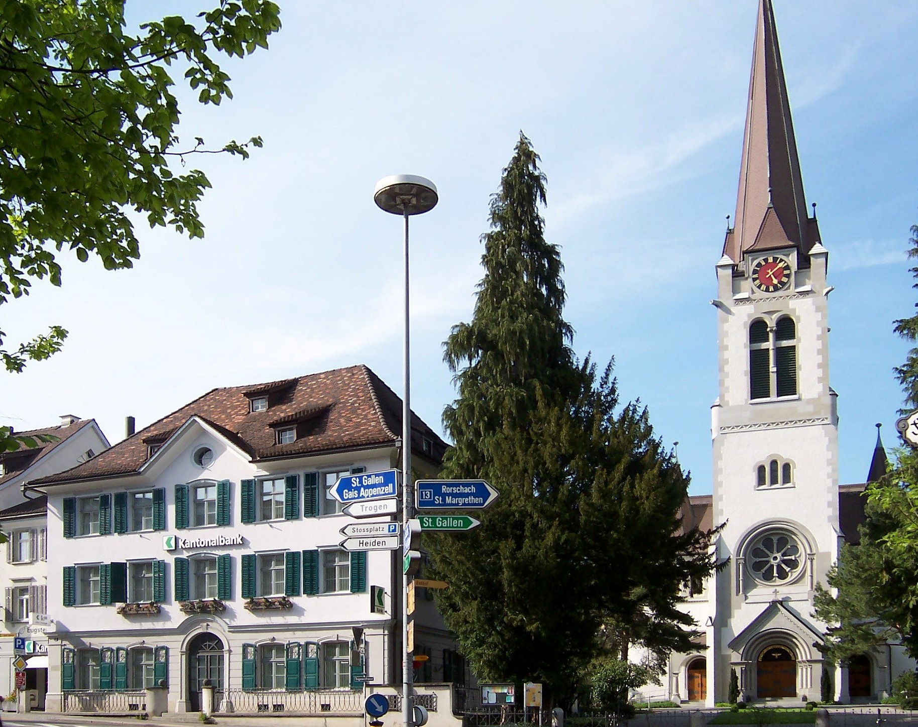 Haus der Familie Johann Matthias und Maria Naeff-Dalp, Geburtshaus von Bundesrat Wilhelm Matthias Naeff in Altstätten. (Erbaut 1802 in klassizistischem Stil, heute Filiale der St.Galler Kantonalbank)